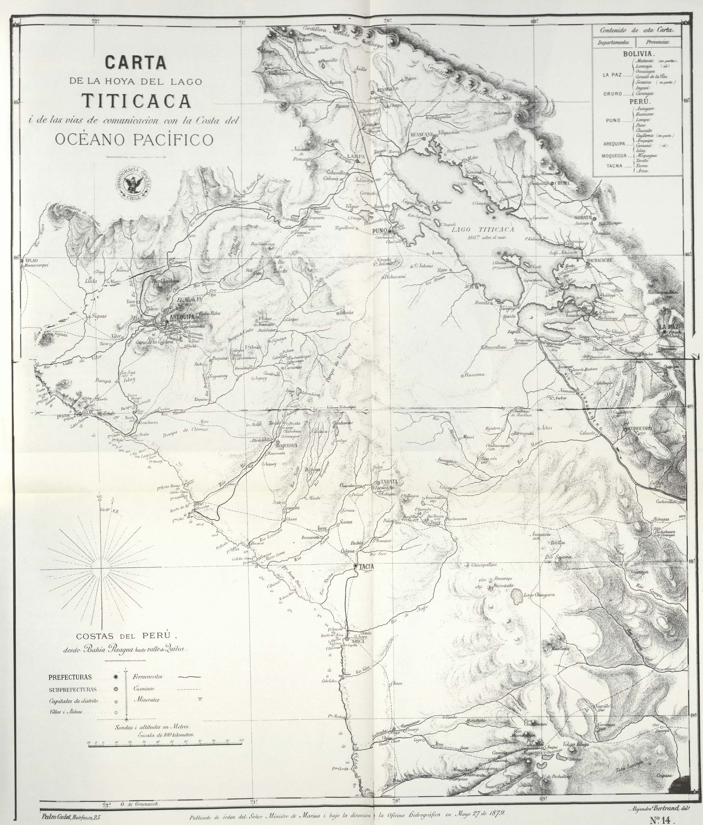 Carta de la hoya del lago Titicaca i de las vías de comunicación con la costa del oceáno Pacífico